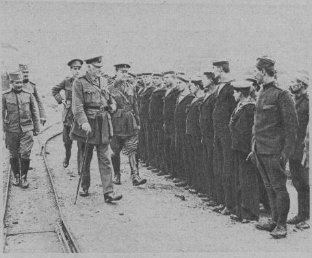 L'amiral anglais Troubridge inspectant les marins serbes sur le front de Macédoine.